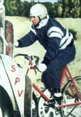 José Meiffret, (near 1962), 'Campioni dello Sport 1969 - 1970', Panini figurina n°431.